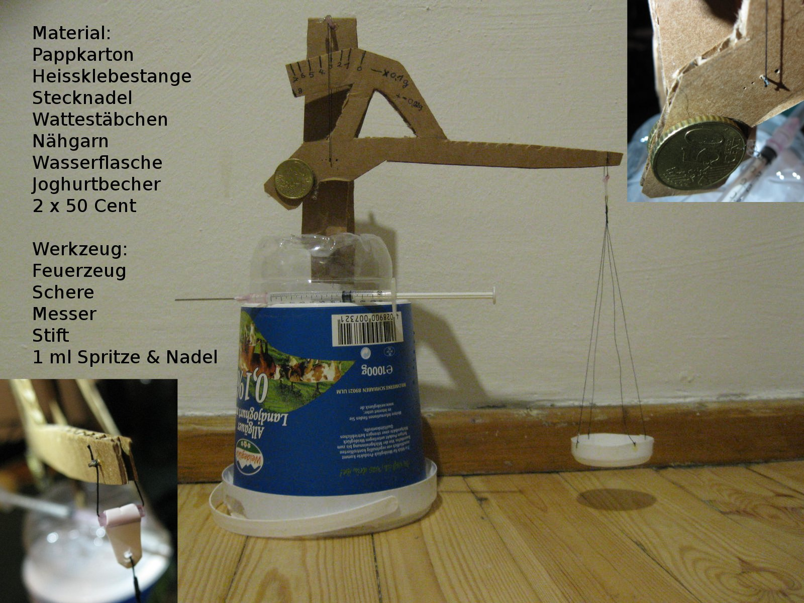 Feinwaage aus Müll 0.1 - 0.8g +- 0.02g